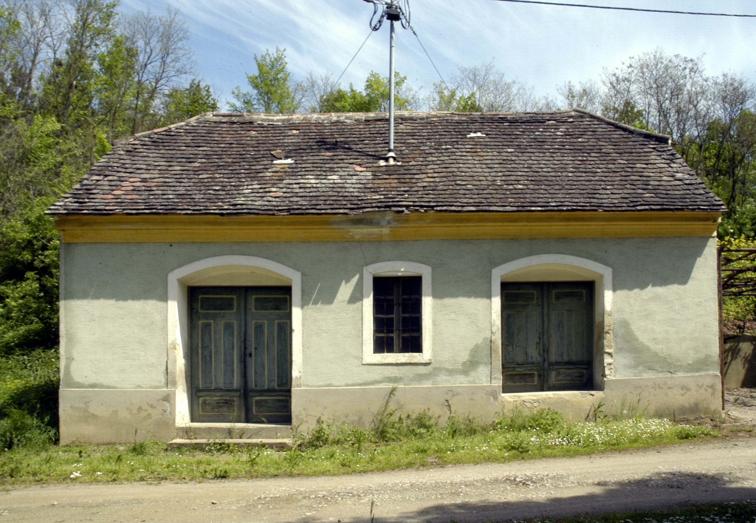 Objekt in der Mühlkellergasse in Frauendorf an der Schmida